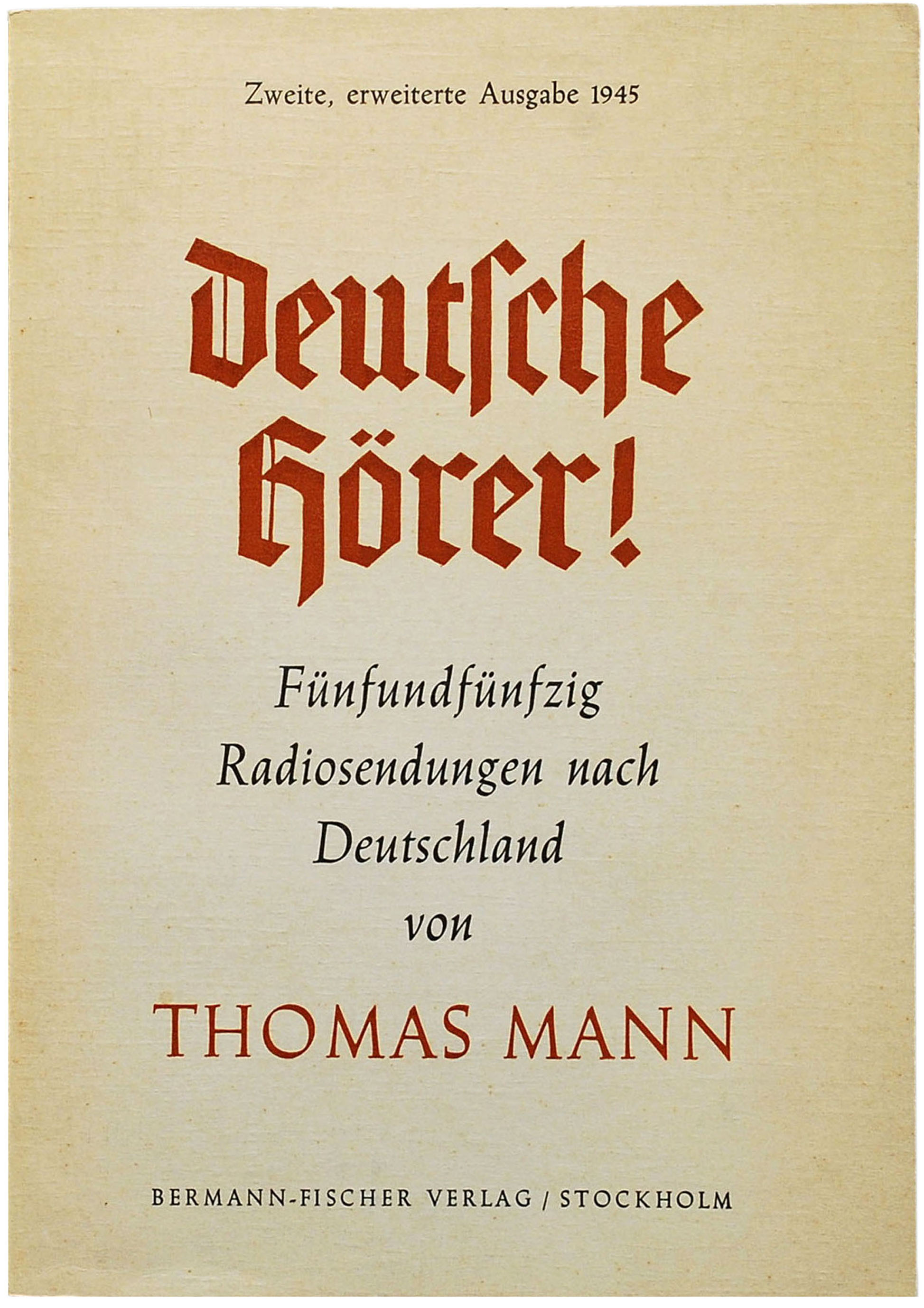 Mann, Thomas: Deutsche Hörer! 55 Radiosendungen nach Deutschland. Zweite, erweiterte Ausgabe. Stockholm: Bermann Fischer 1945, 132 Seiten,(Potempa B 72).